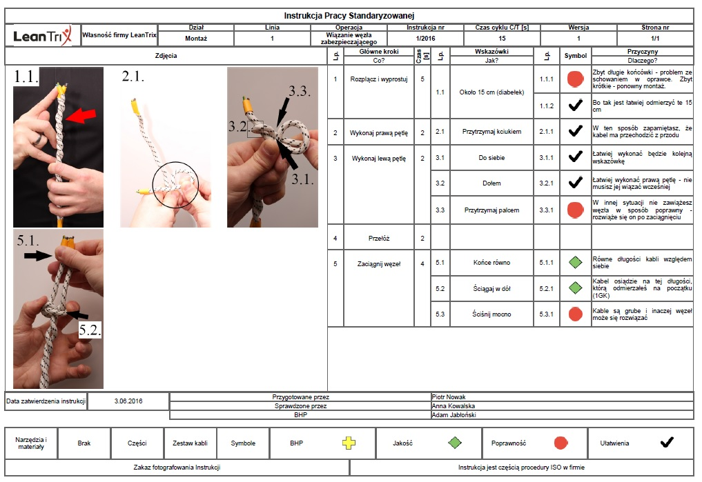 Instrukcja TWI dla historycznego węzła zabezpieczającego z programu TWI